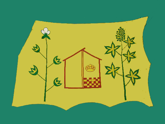 bandeira da cidade de iati